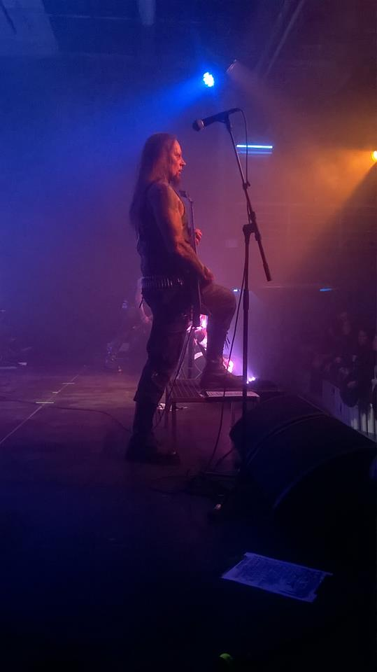 Helmuth Lehner 2016